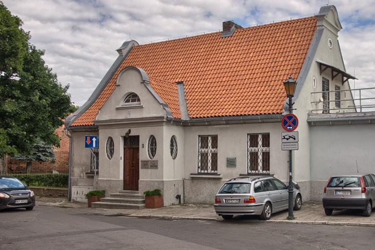 Toruń Dwór generała Wiktora Thomme. Generałówka